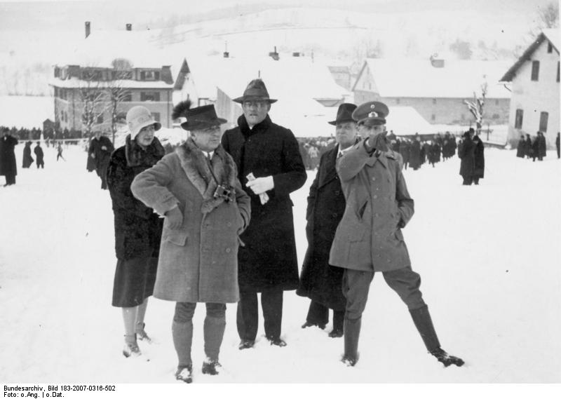 [Ski Wettlauf im bayerischen? Wald] Generalleutnant Ritter v. Leeb